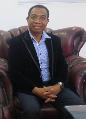 Francisco Miguel Martins, Rektor der UNTL